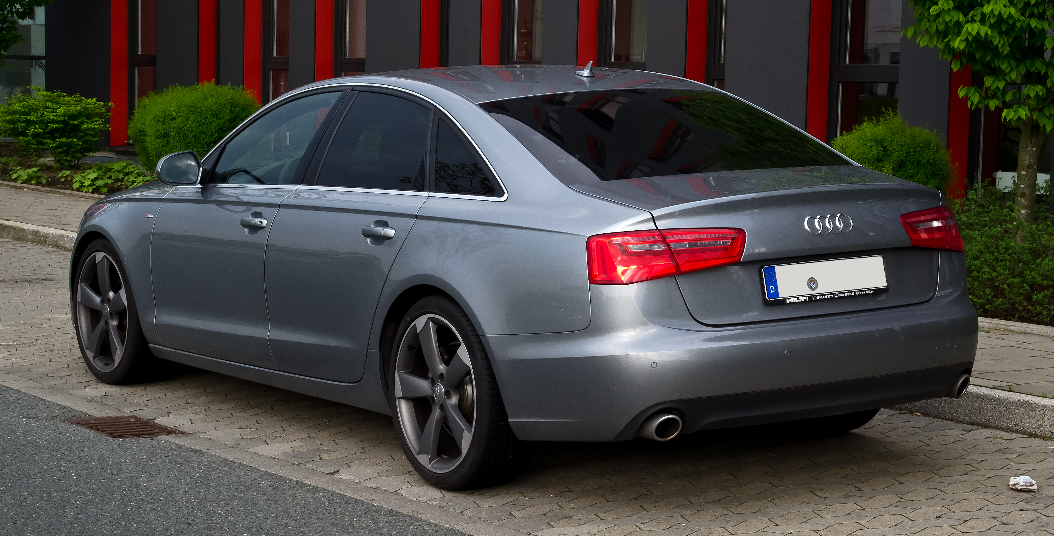 Audi A6 S-line (C7)